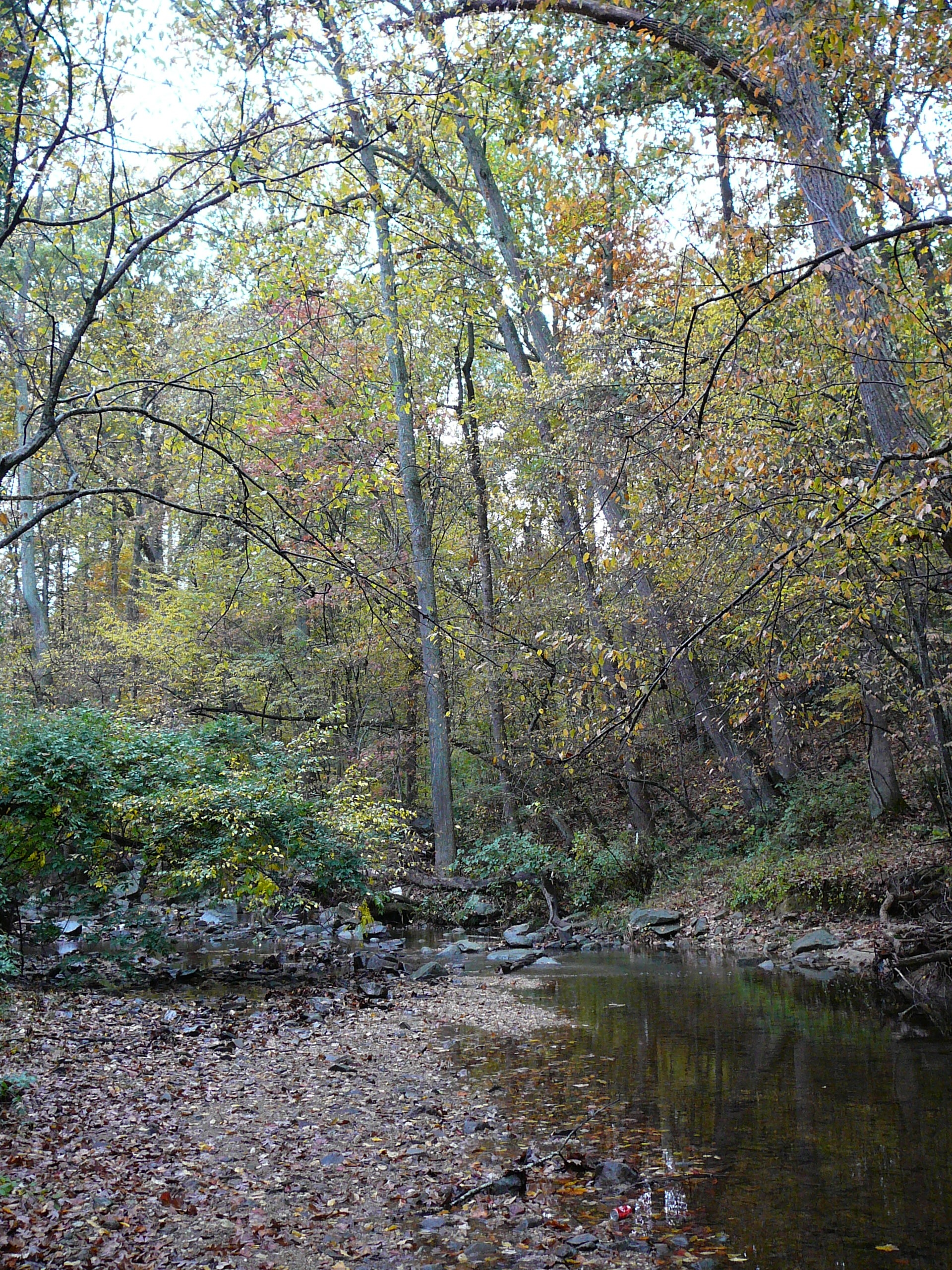 Autumn, trail, river